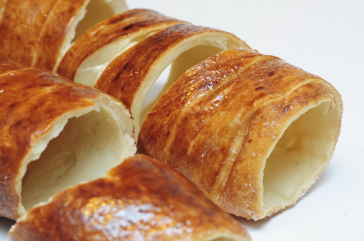 Kürtőskalács megbontott